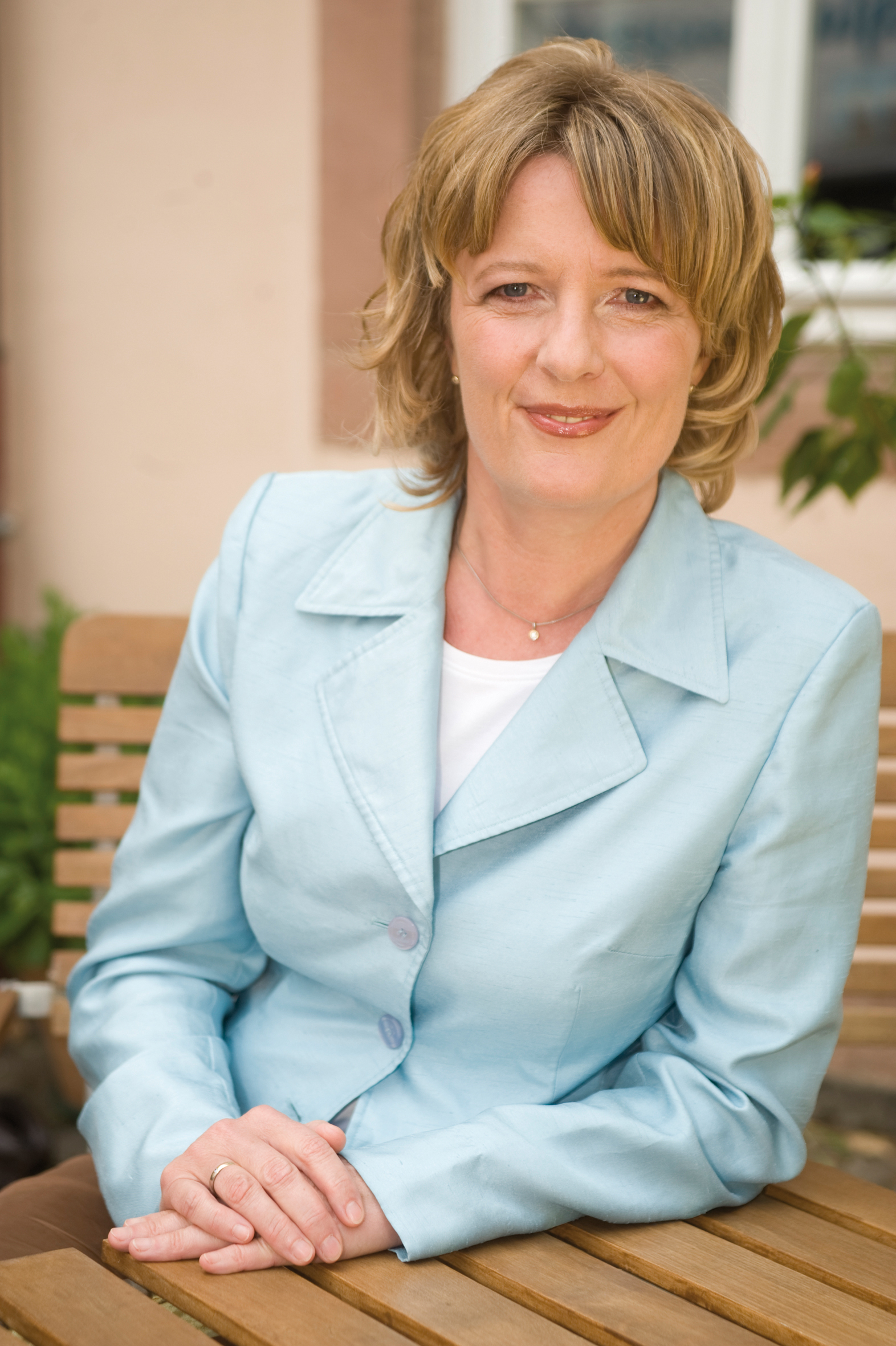 Foto von Christine Scheel, Bundestagsfraktion Bündnis 90/Die Grünen